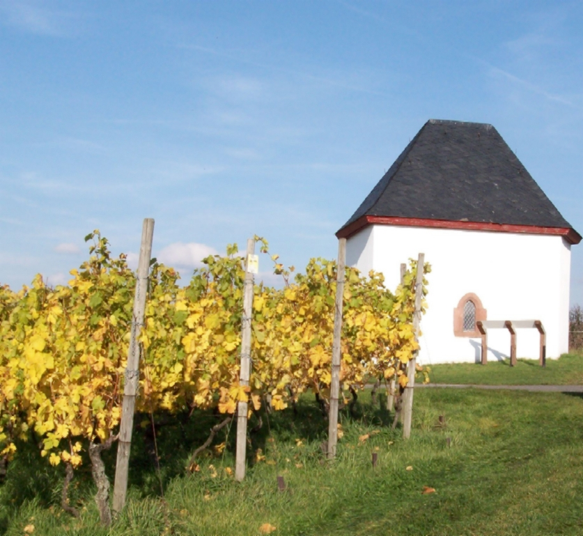 Wendelinuskapelle in den Weinbergen bei Klein-Umstadt